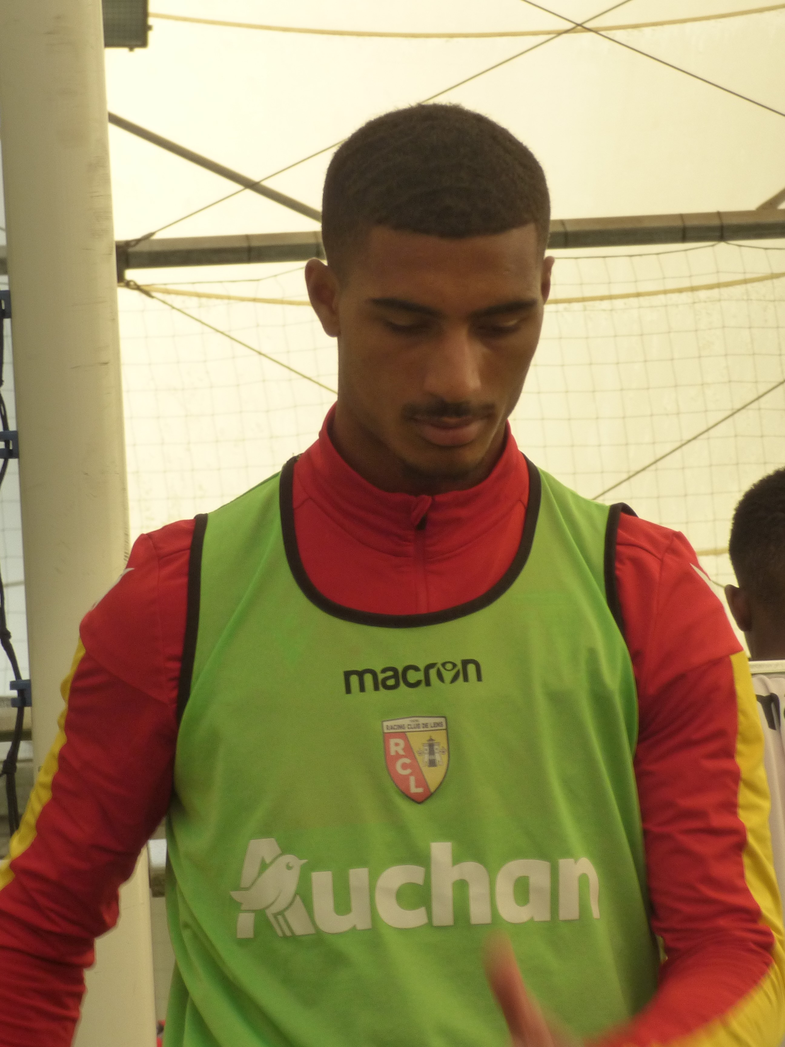 Loïc Badé lors d'un entraînement à huis-clos du Racing Club de Lens, le 3 juillet 2020, au centre technique et sportif de La Gaillette.